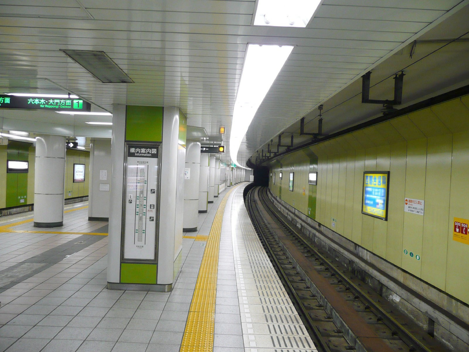 落合南長崎駅ホーム